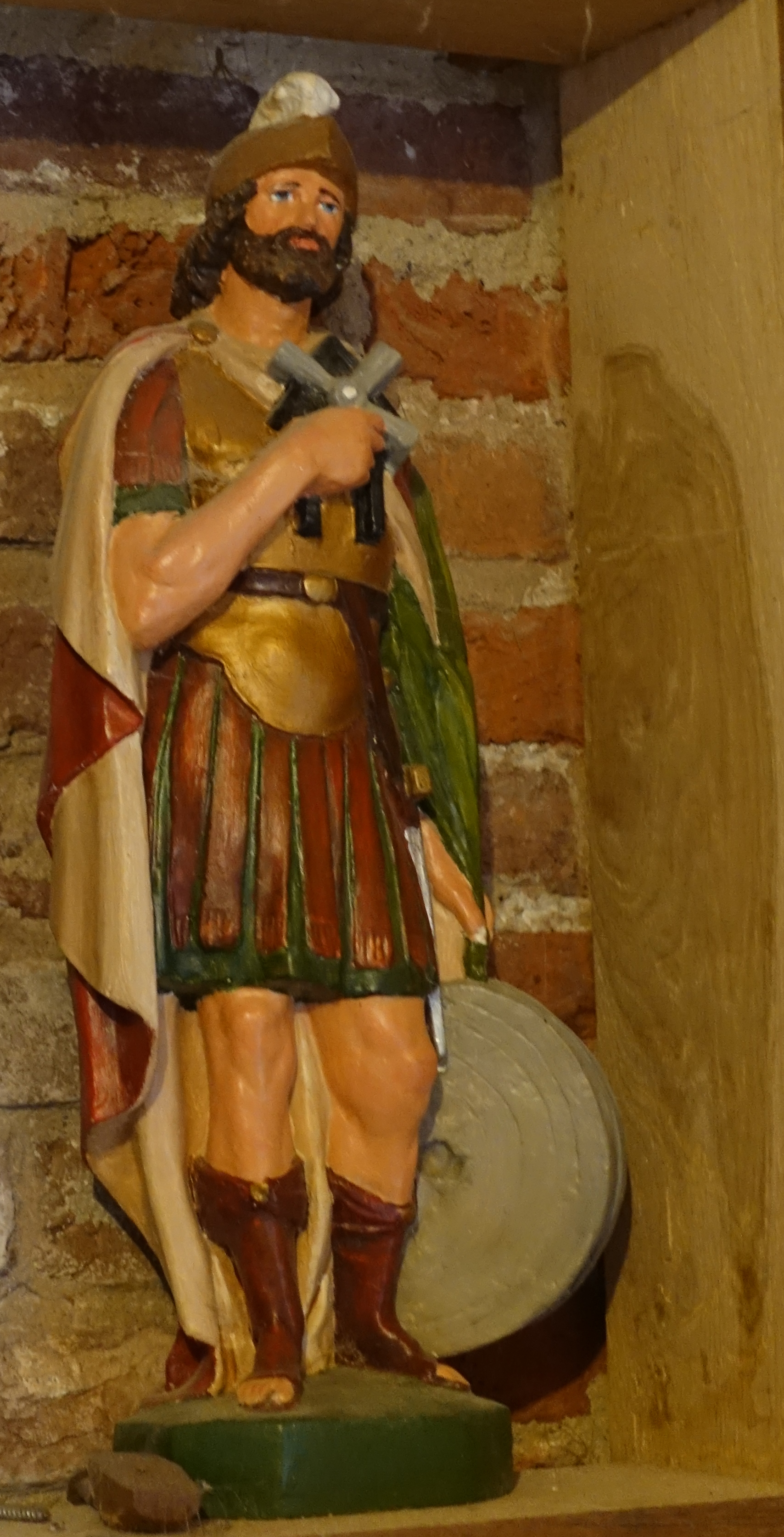 De heilige Victor, patroon van de molenaars, in Molen de Valk, Montfoort